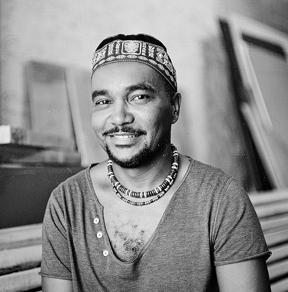 Сиятвинда григорий